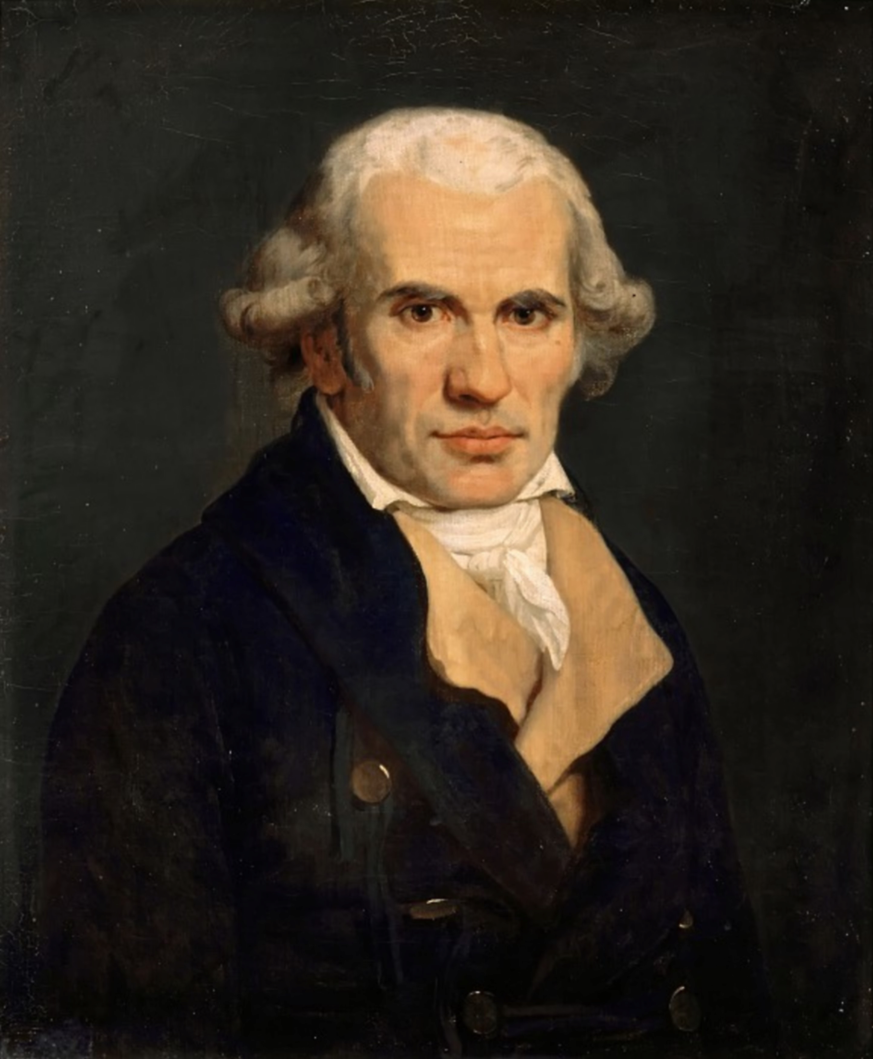 Jean-Baptiste Mauzaisse – Gaspard Monge, Comte de Peluse (1746-1818). Château de Versailles. Жан-Батист Мозесс – Гаспар Монже (1746-1818), граф де Пелюз. Версальский дворец.